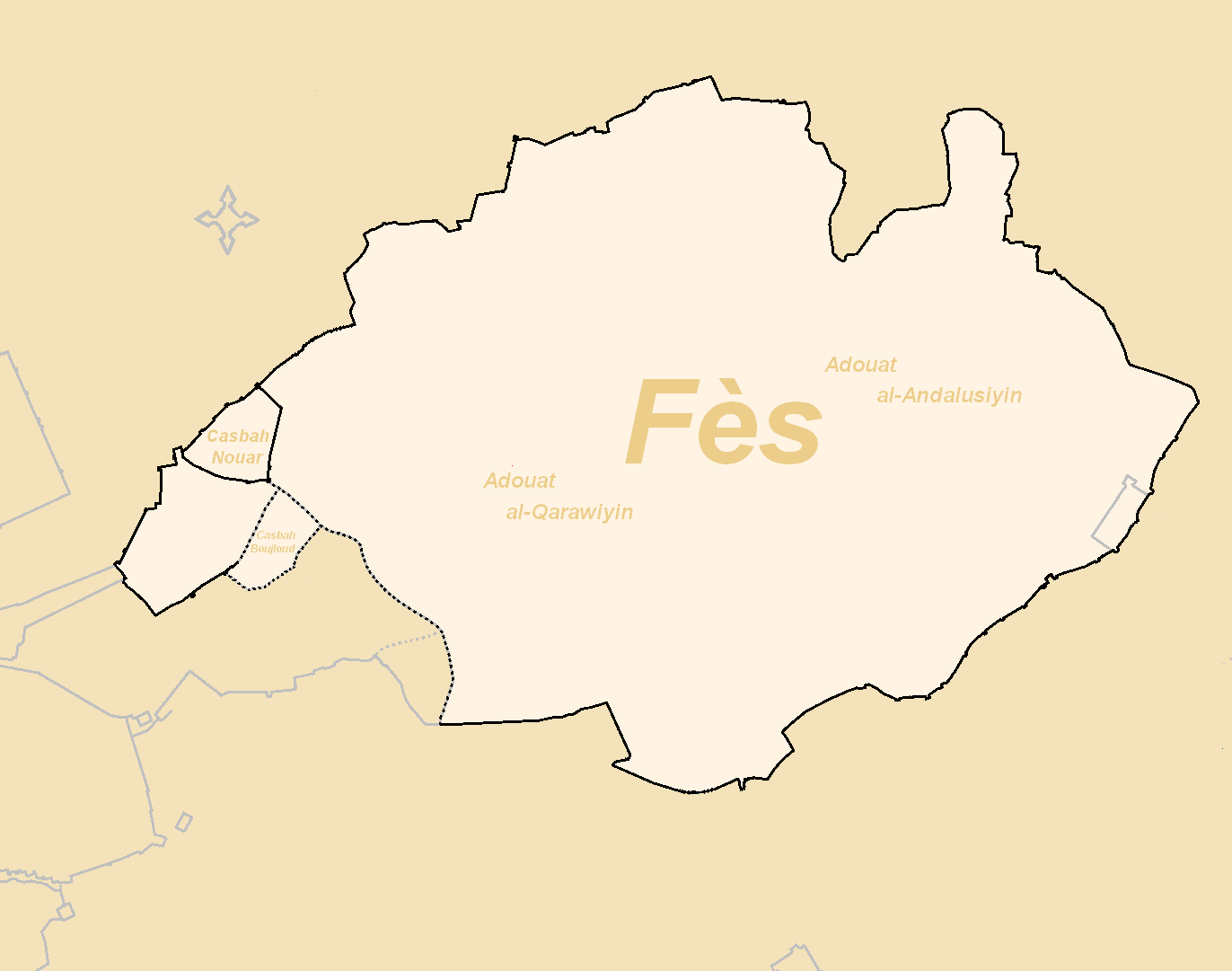 Plan de Fès et de ses fortifications pendant l’ère almohade.